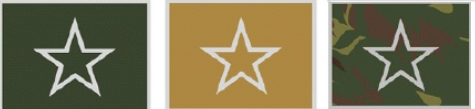 Insígnia do Aluno do Curso de Formação de Sargentos do Exército (CFS EB) de 1999 a 2015